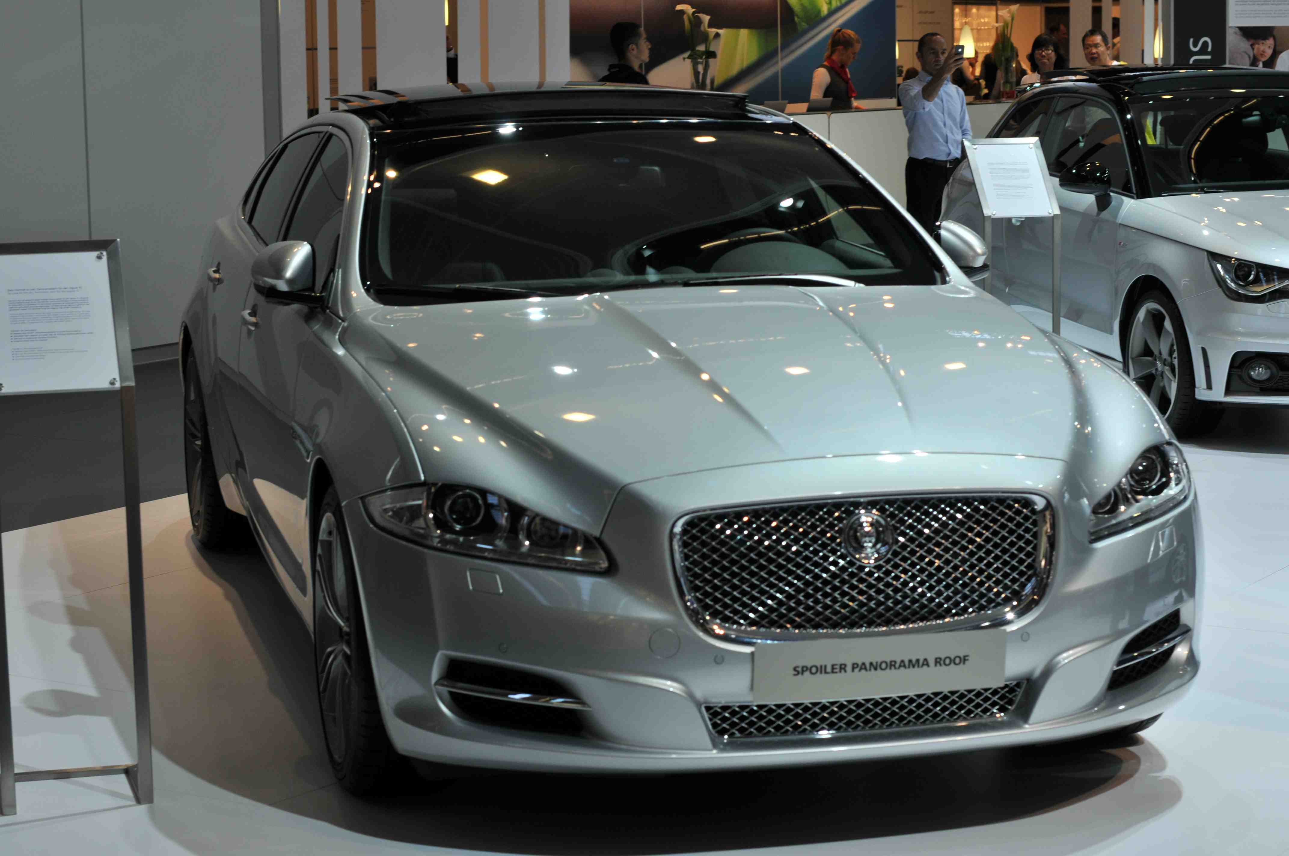 IAA 2011 - Internationale Automobilausstellung in Frankfurt/Main